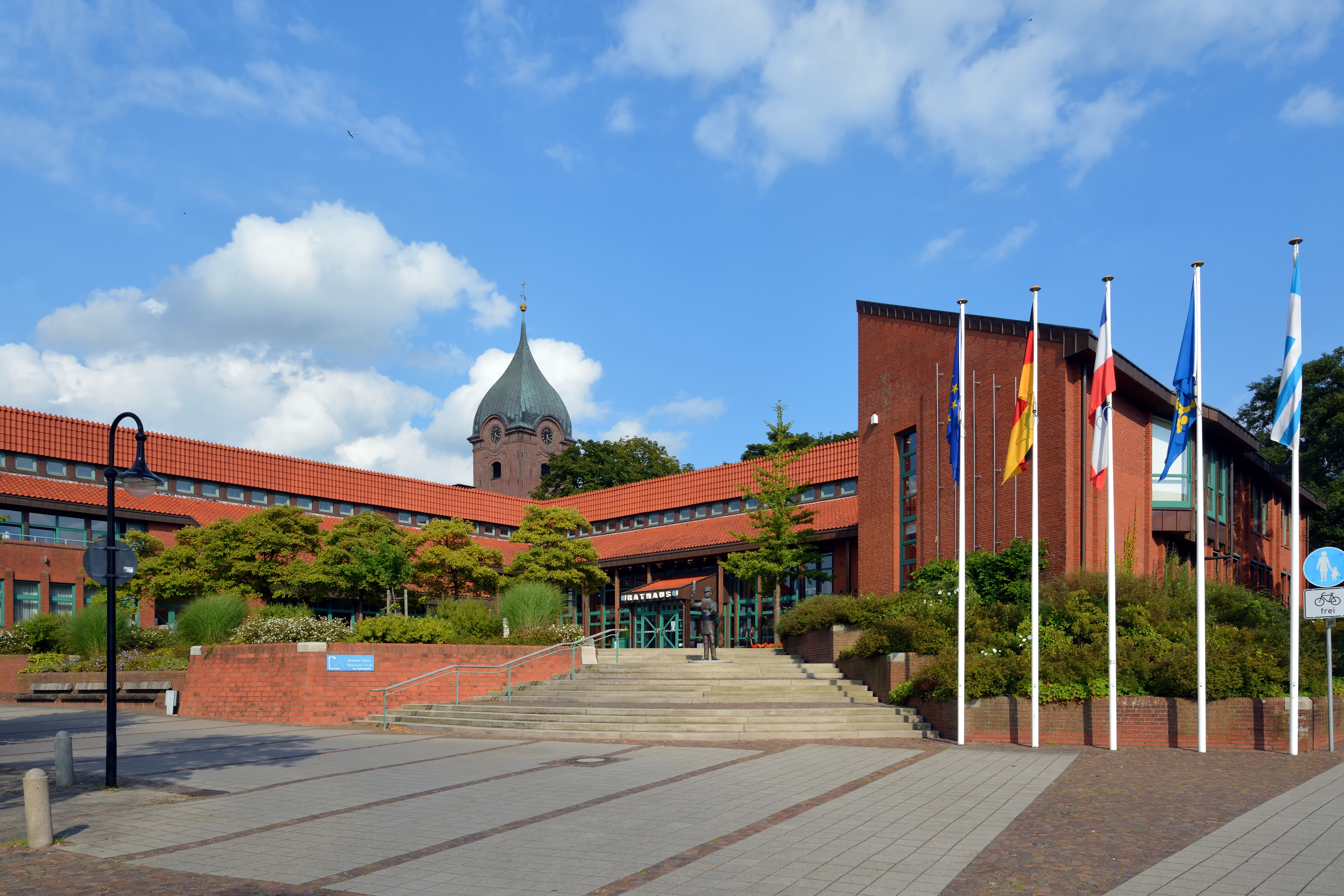 Das Rathaus in Hohenwestesdt ist gleichzeitig Amtsgebäude des Amtes Mittelholstein.